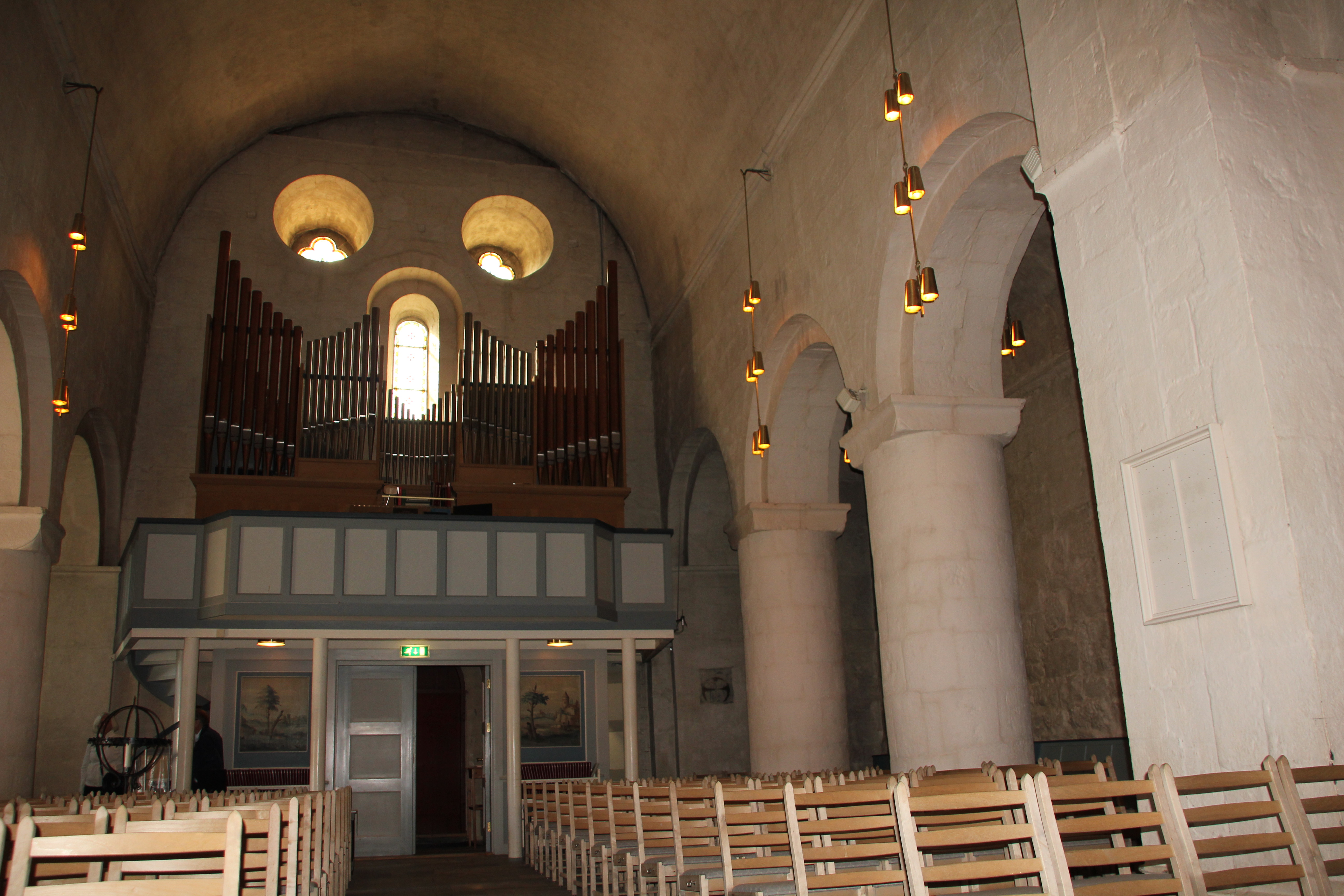 Skipet i Ringsaker kirke.